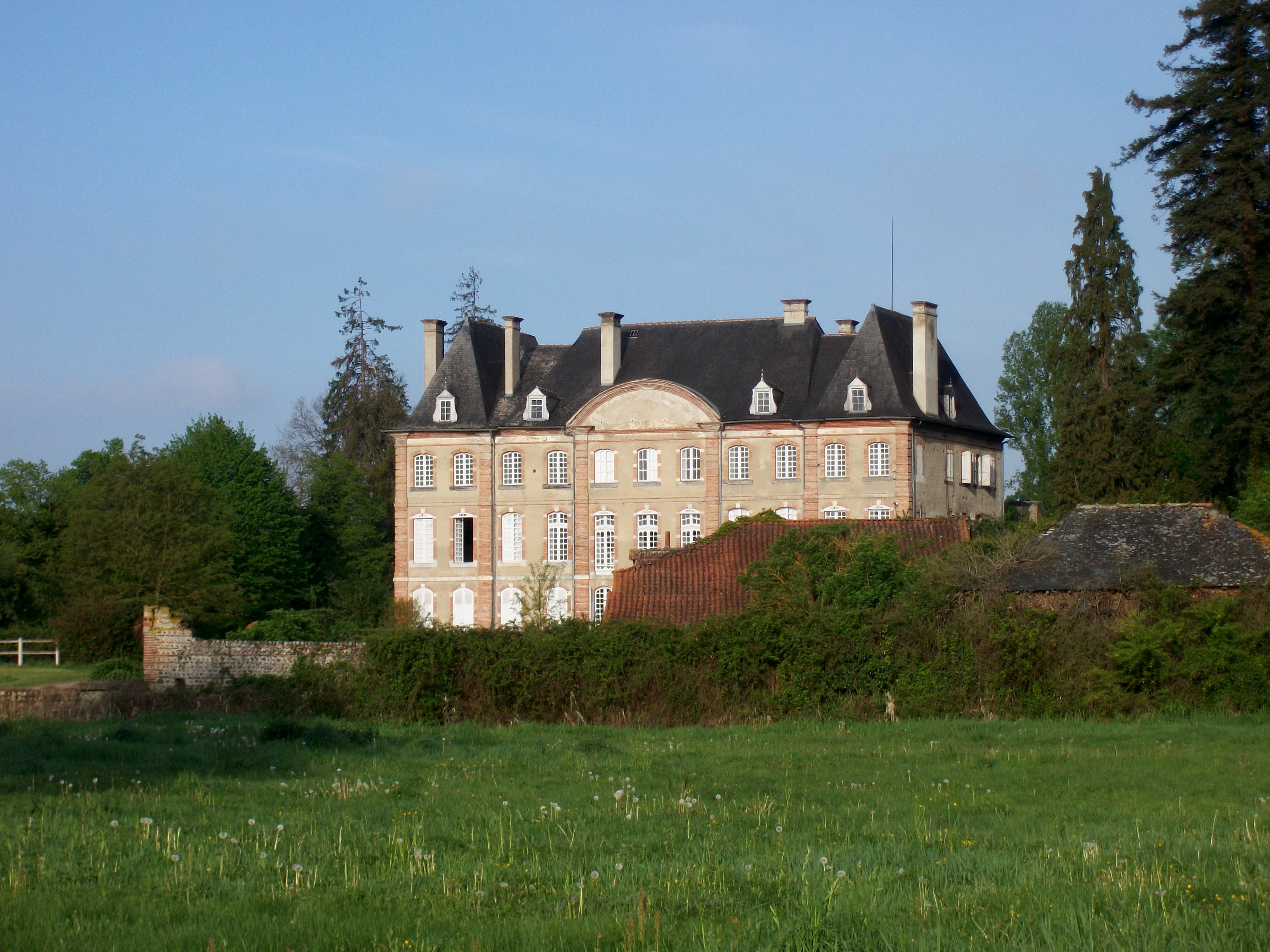 Château de Tostat (Hautes-Pyrénées, France)